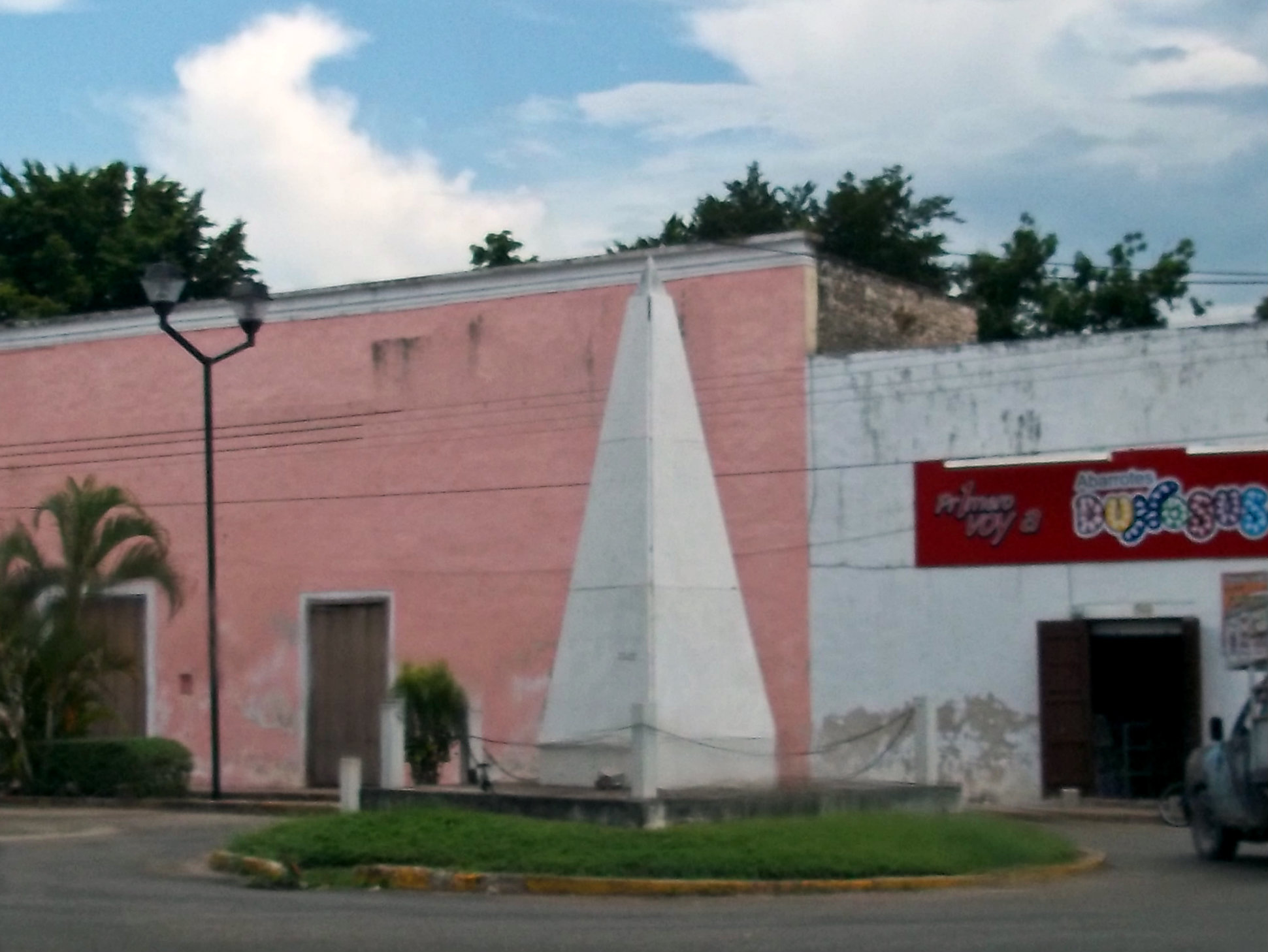 Obelisco a los Quince Grandes de Espita.